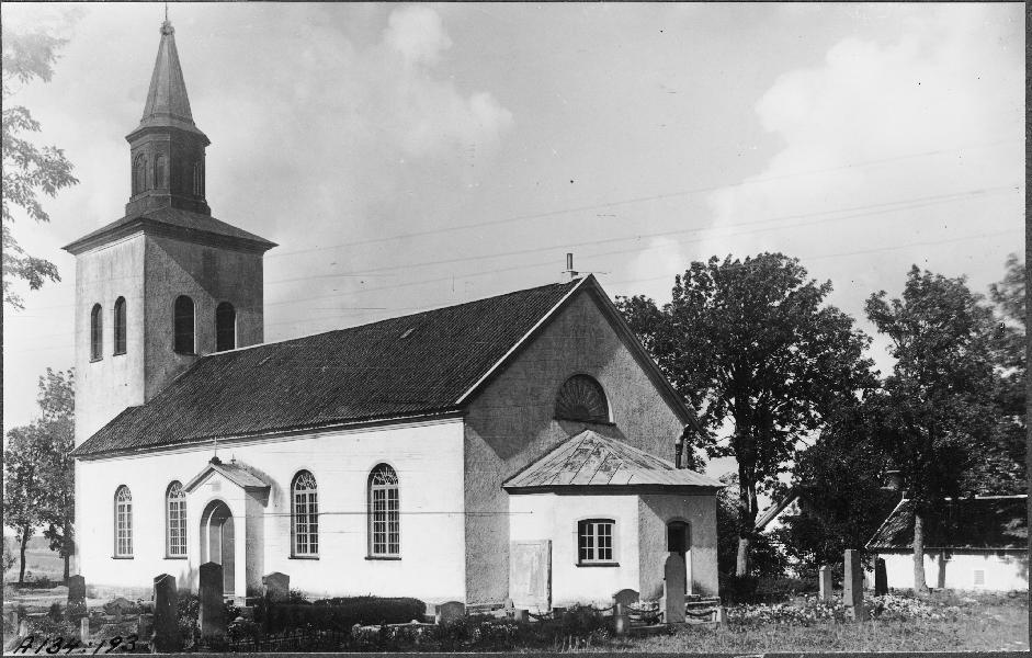 Kyrkan från sydöst. Kategori: (01) ExteriörerKyrkan från sydöst.